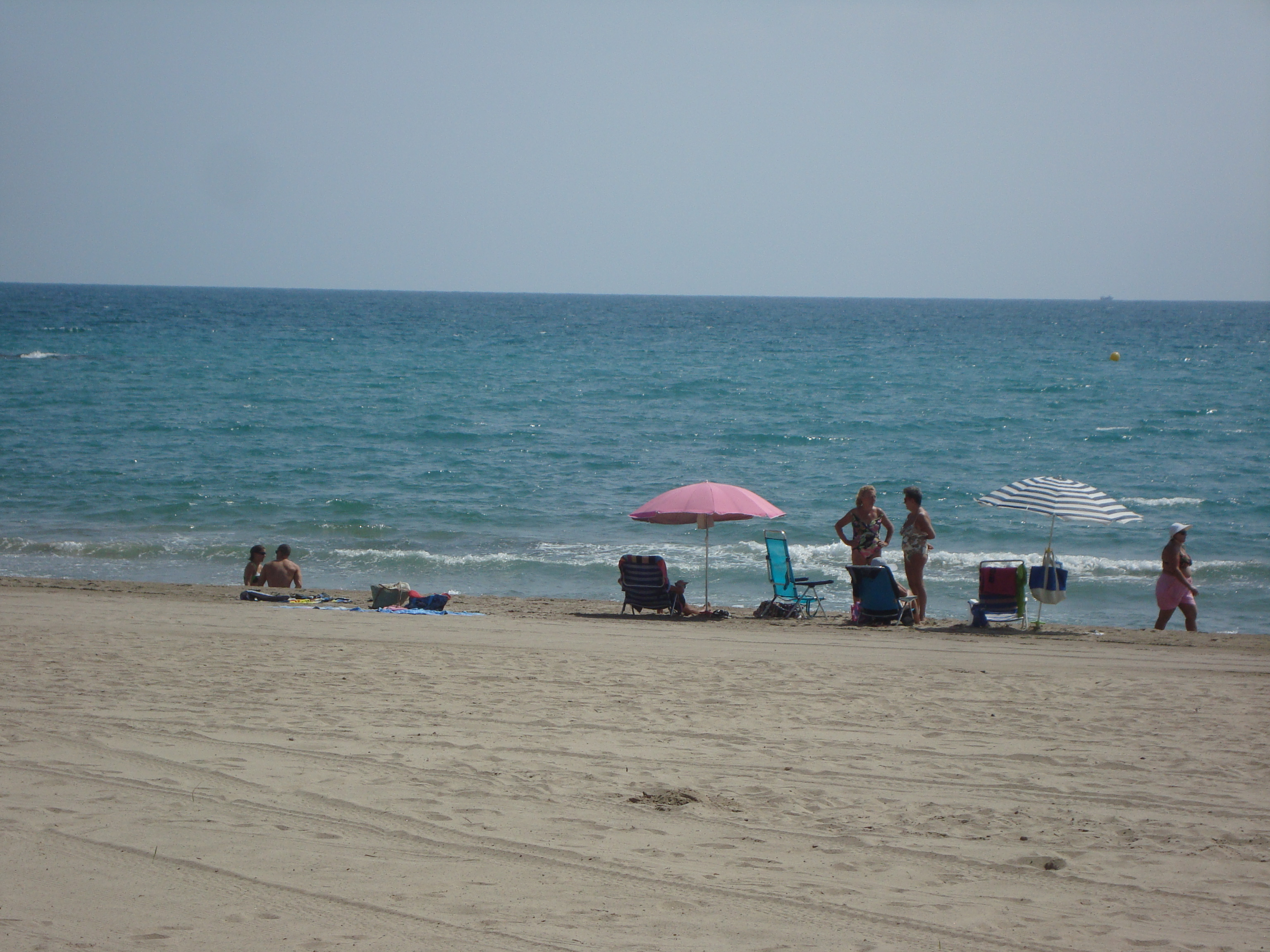 Platja d'Heliòpolis (Benicàssim) This is a a photo of a beach in the Land of Valencia, Spain, with id: PL-1425